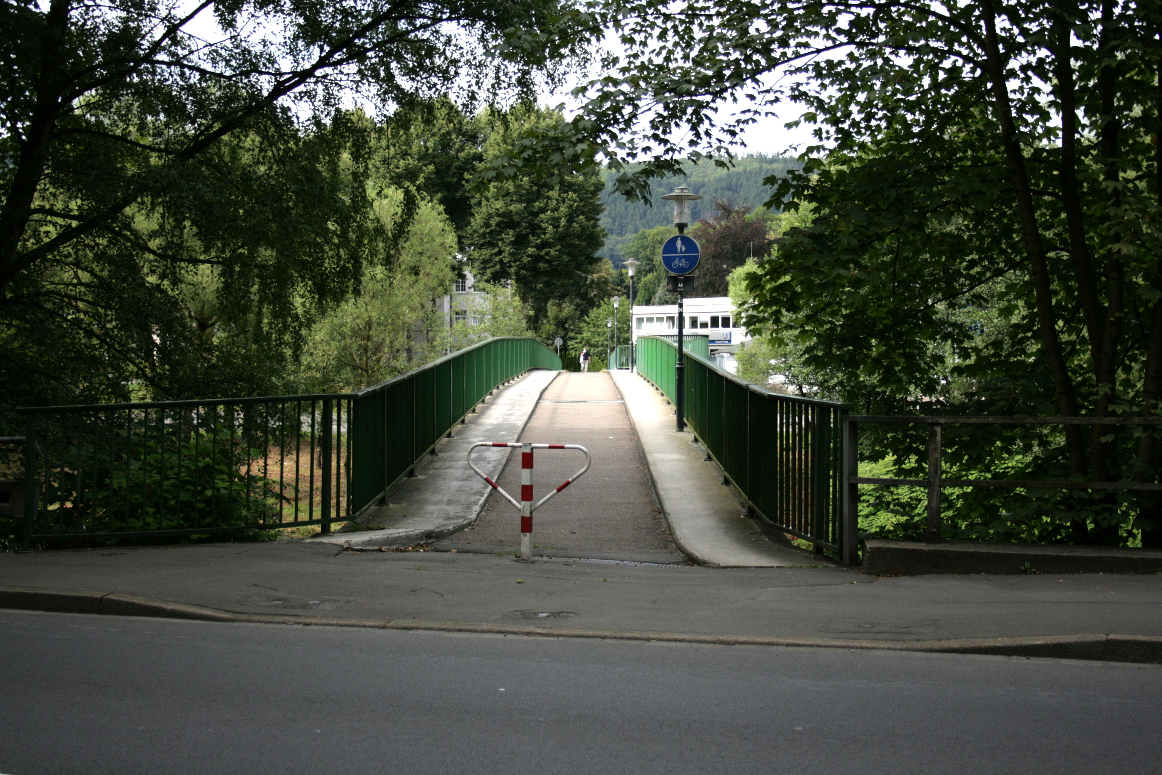 Schnapsbrücke in Werdohl